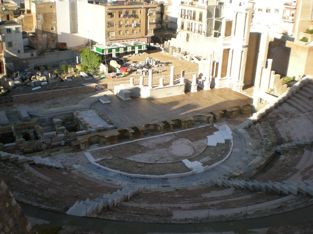 Teatro Romano de Cartagena